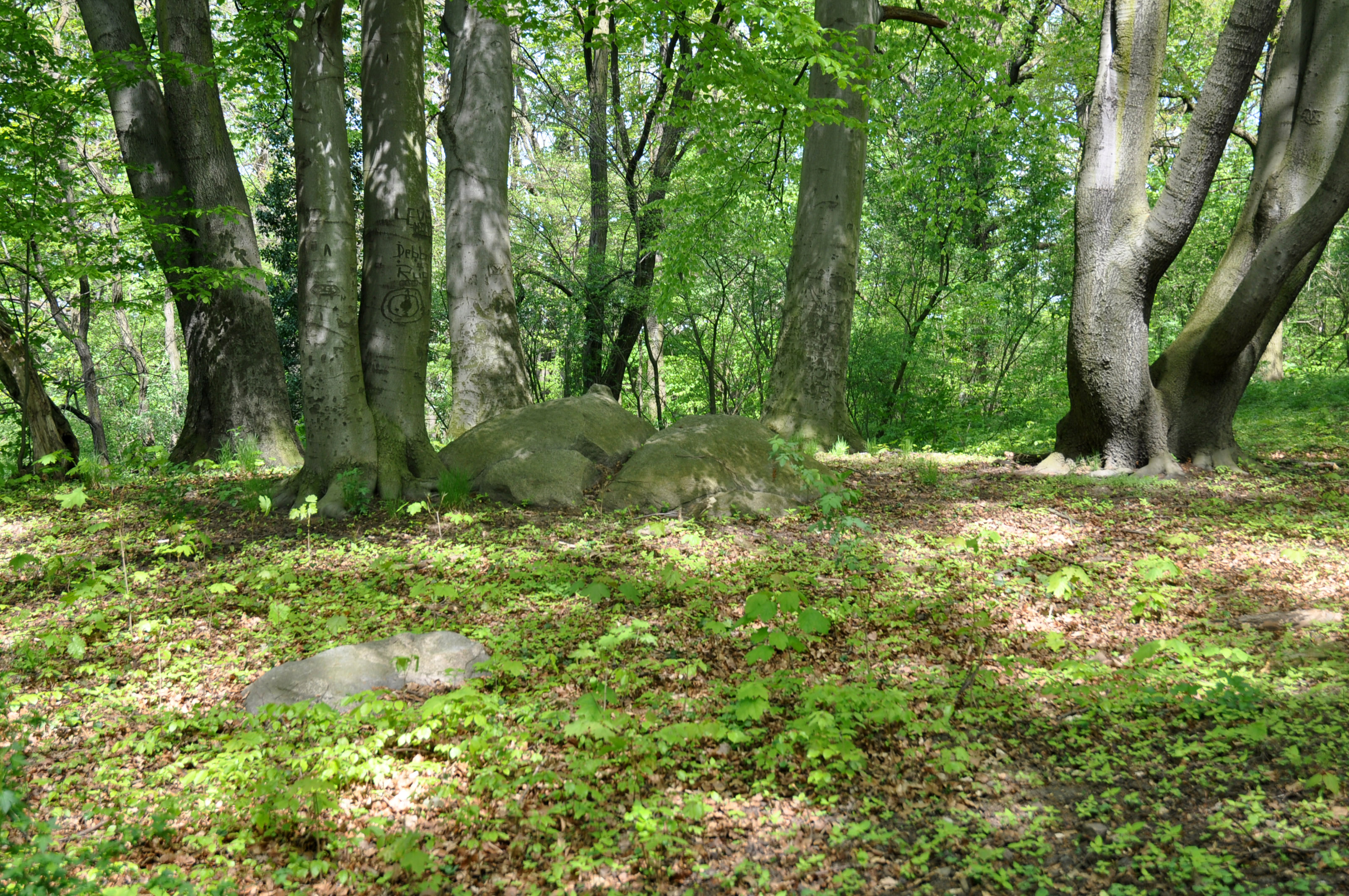 Buchengruppen im Böttcherbergpark